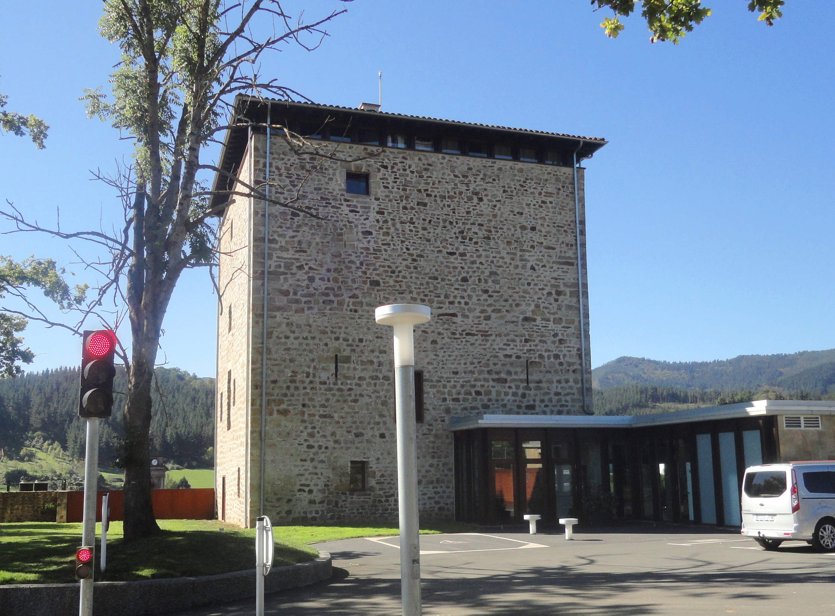 Zumetzegi dorrea - Oñati